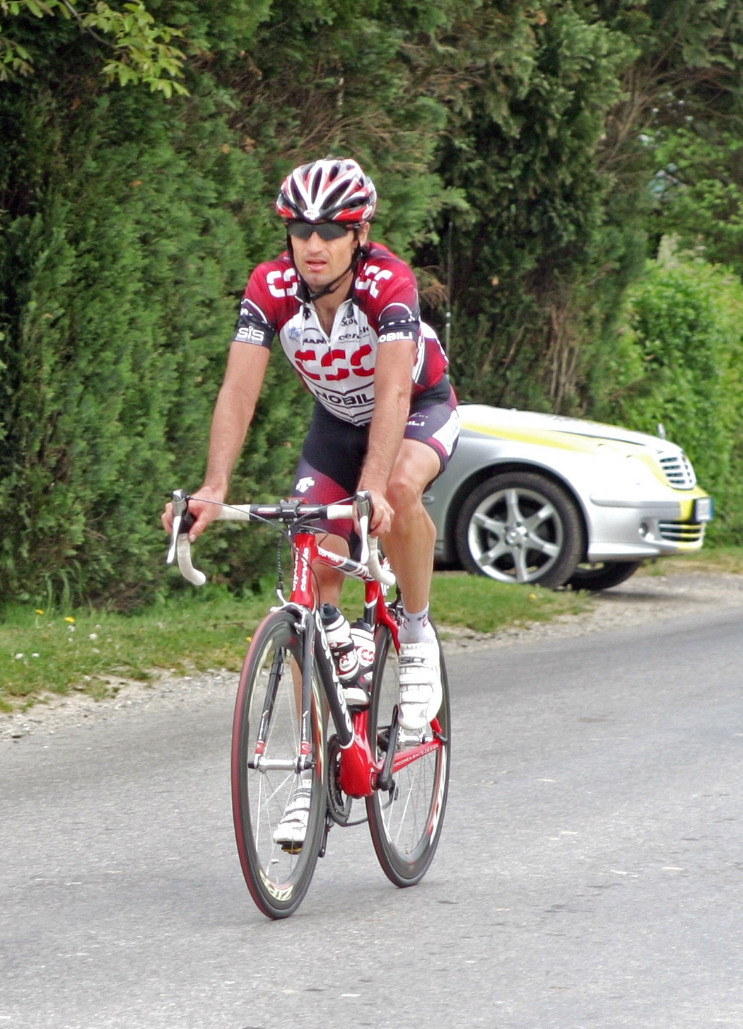 De Bobby Julich.